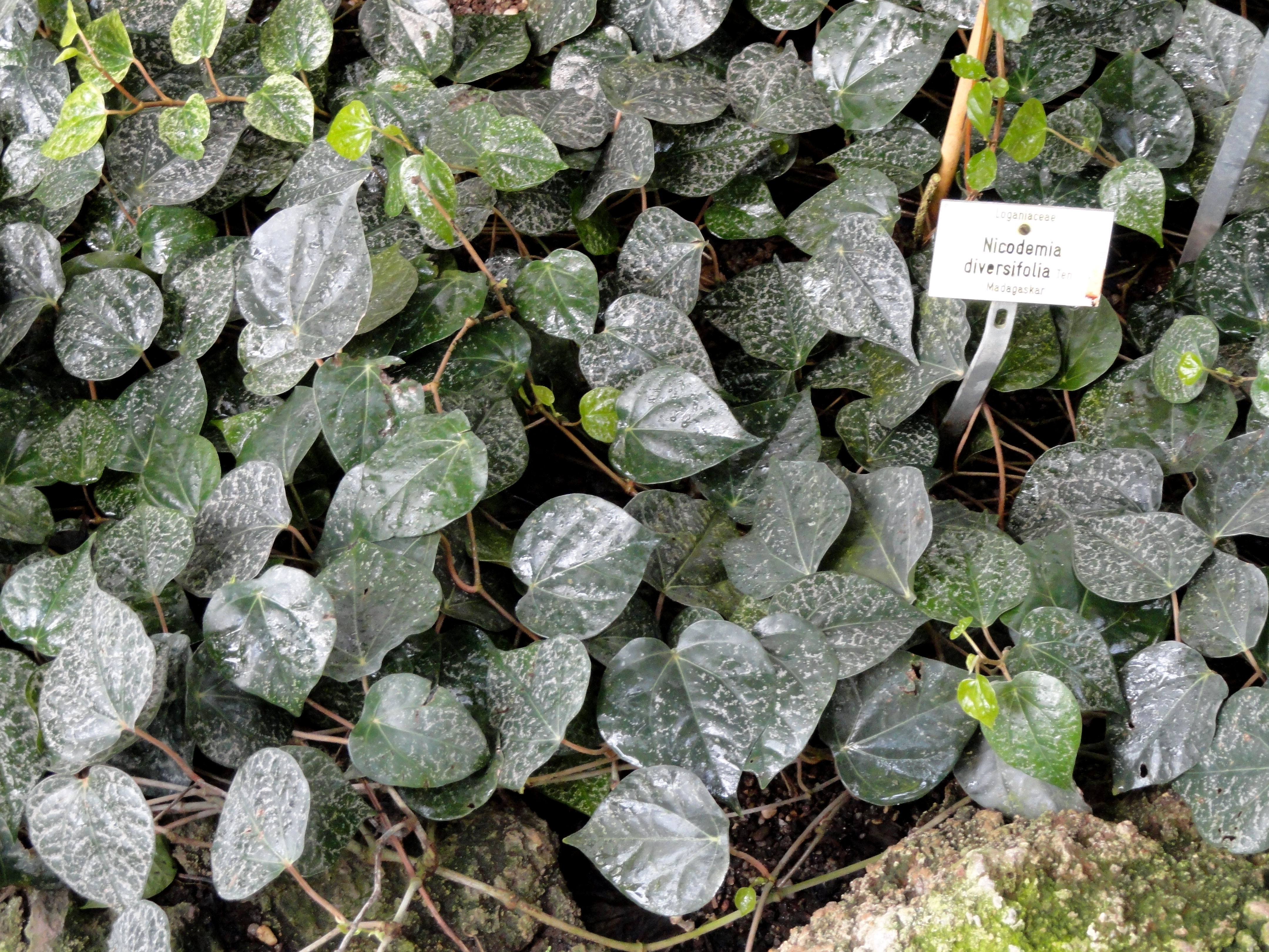 Nicodemia diversifolia specimen in the Botanischer Garten München-Nymphenburg, Munich, Germany.